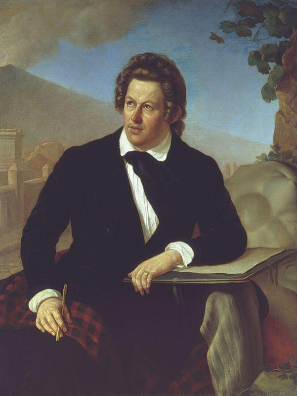 Завьялов Федор. Портрет художника К.П.Брюллова. 1844